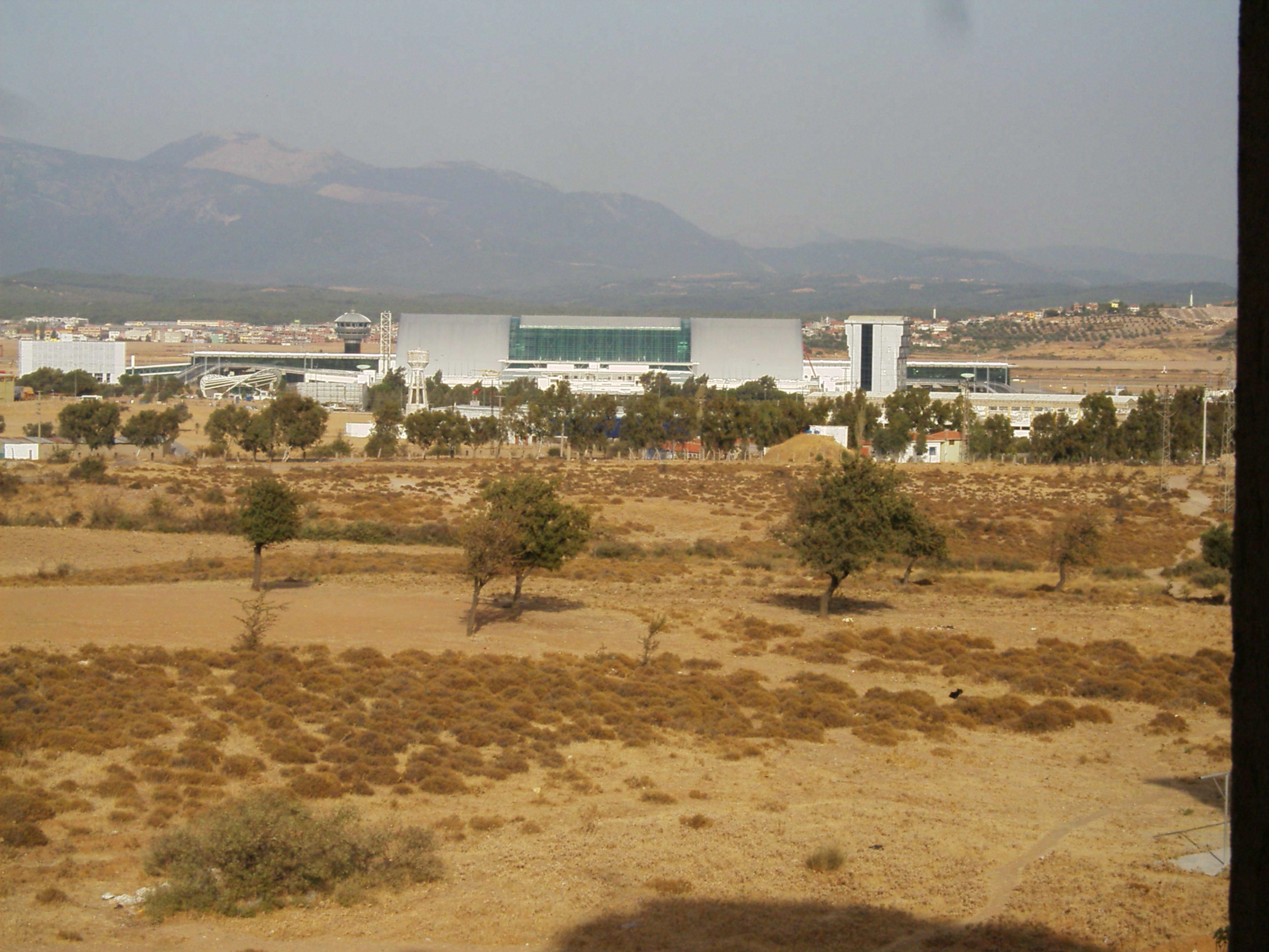 Izmir Airport